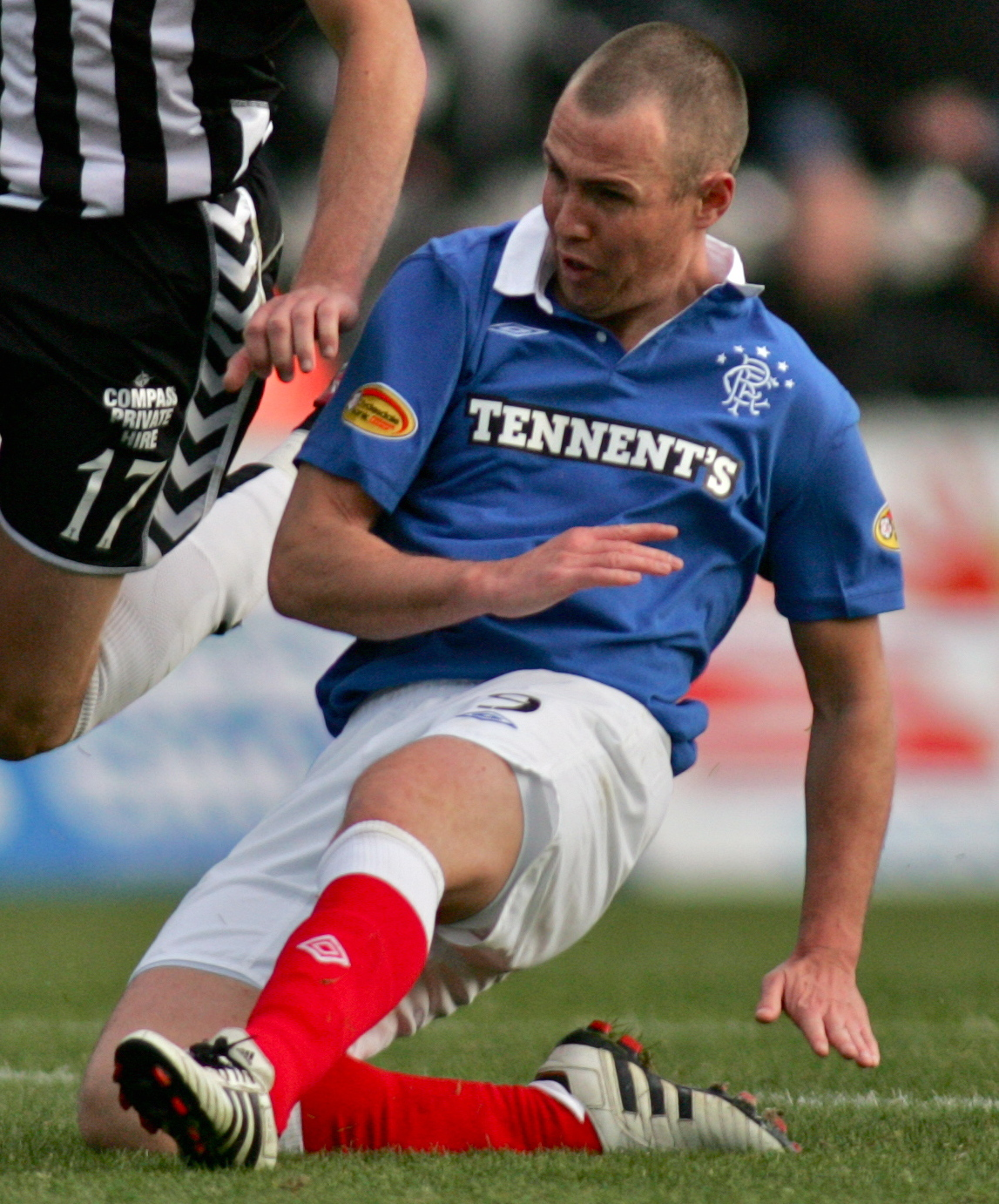 HI7Y0286